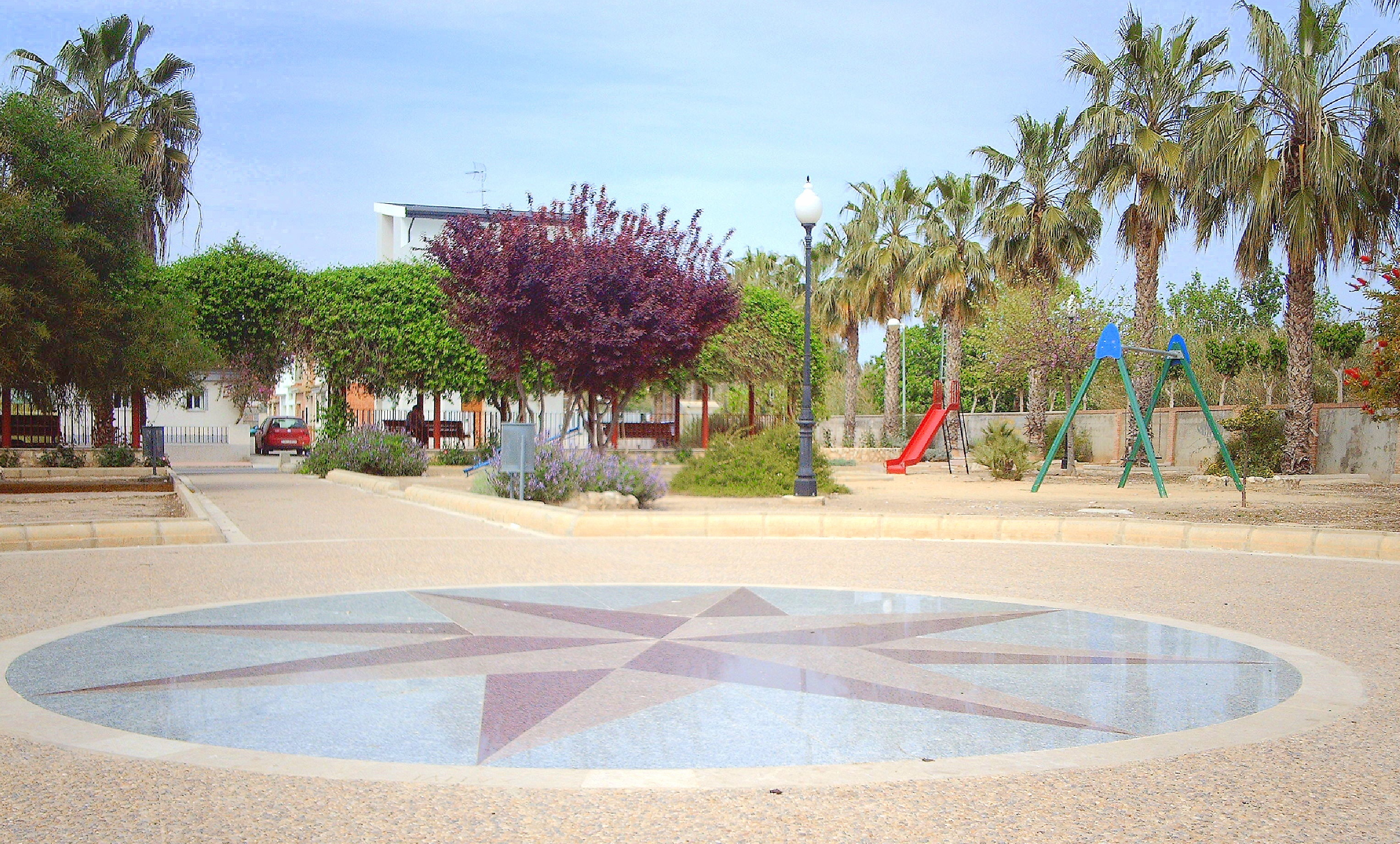 Parc de Tirant Lo Blanch (l'Estrela), Albalat de la Ribera